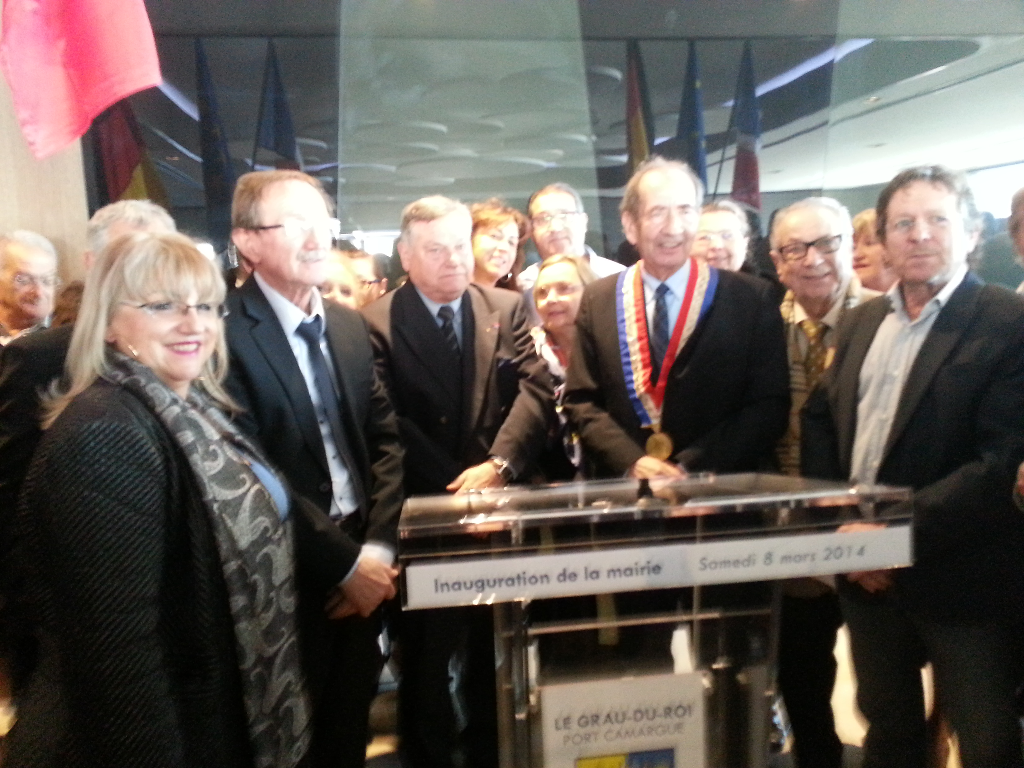 Le maire du Grau-du-Roi Étienne Mourrut entouré d'une partie de son conseil municipal (Annie Brachet, Léopold Rosso) lors de l'inauguration du nouvel hôtel de ville, le 8 mars 2014.